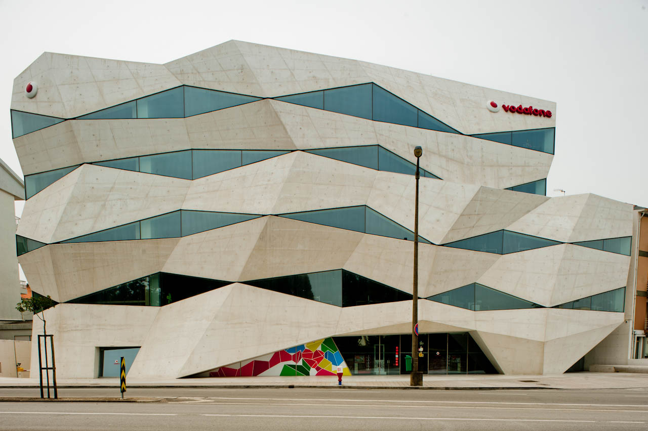 Vodafone Headquarters Building Oporto Barbosa & Guimarães Arquitectos 2009 Porto Portugal 2011-08-21